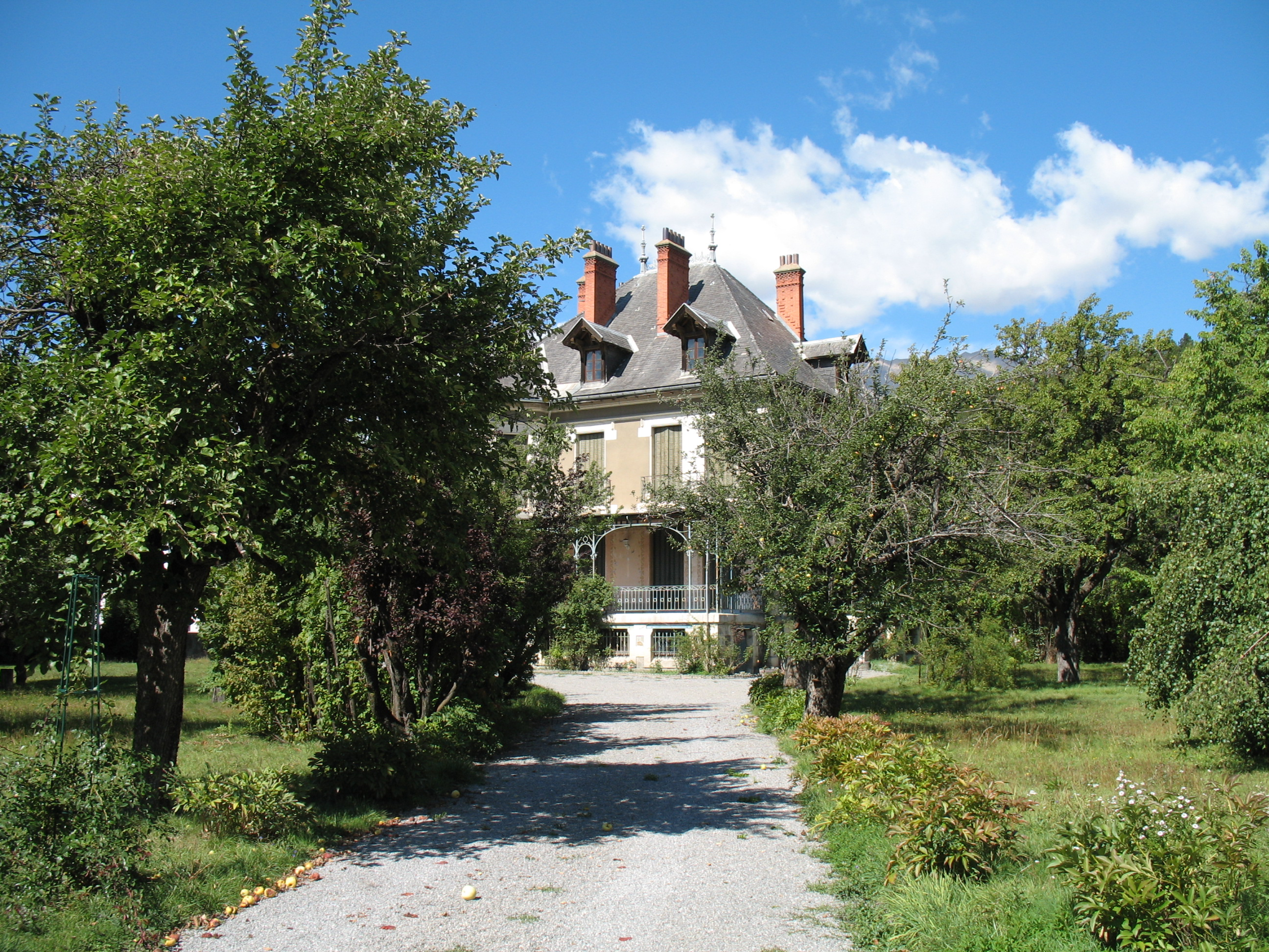 Barcelonnette, département des Alpes-de-Haute-Provence, France